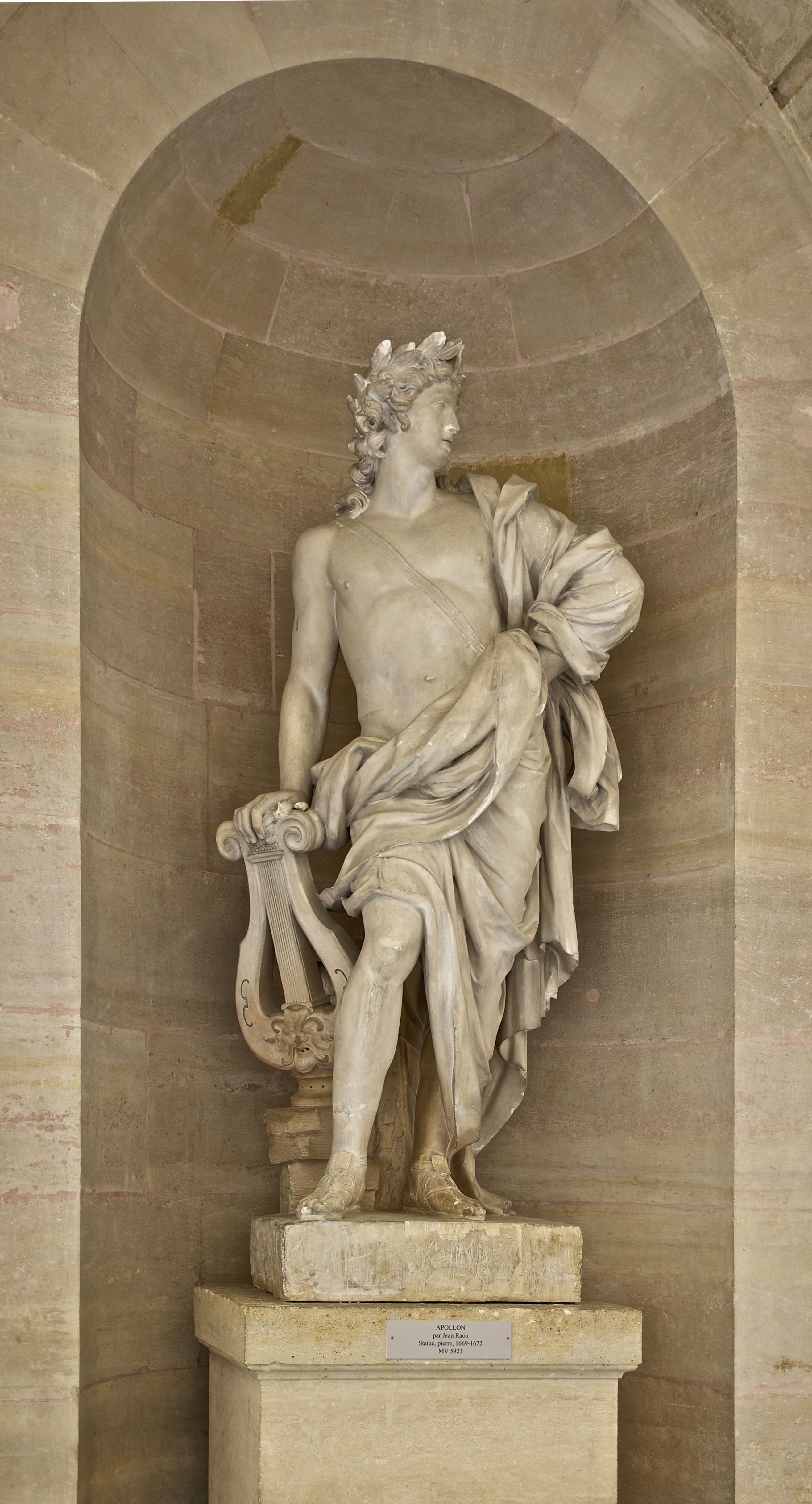 Apollon avec une cythare.